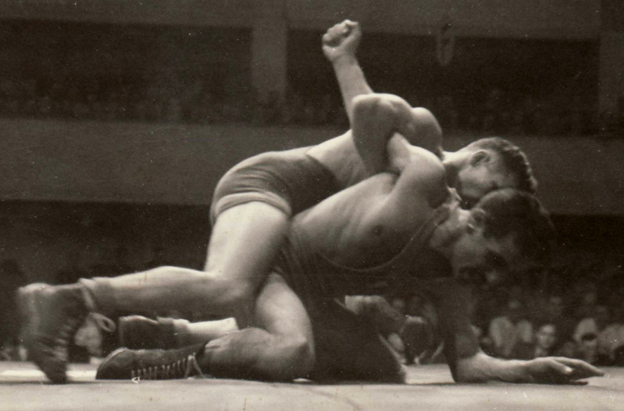 Helsingin vapaapainin MM-kisoissa 1951 Niilo Turkkila italialaisen Ferninando Carranon päällä.